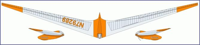 Horten 4